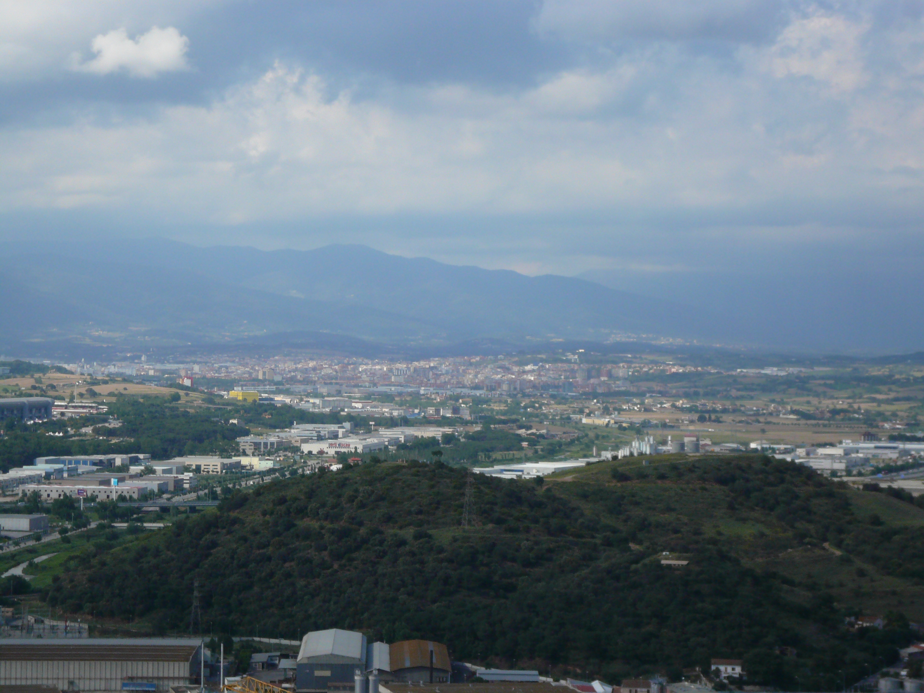 Les Tres Creus, muntanya entre Montmeló i Montornès del Vallès, vista des de prop del Telègraf (a Montornès). Al darrera, bona part del Vallès Oriental.